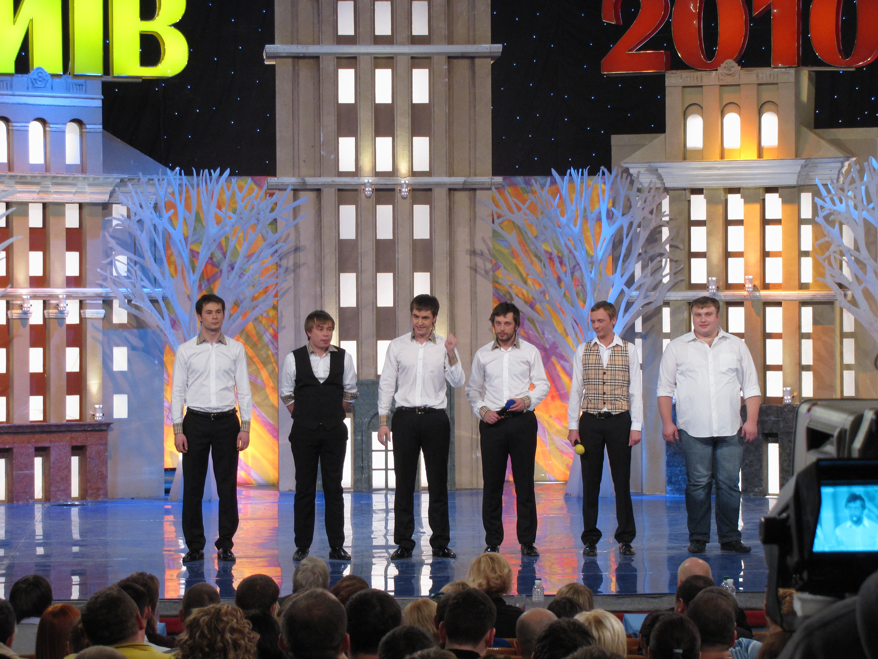 «Парапапарам» — команда КВН из Москвы, МГИМО. Капитан - Иван Абрамов.